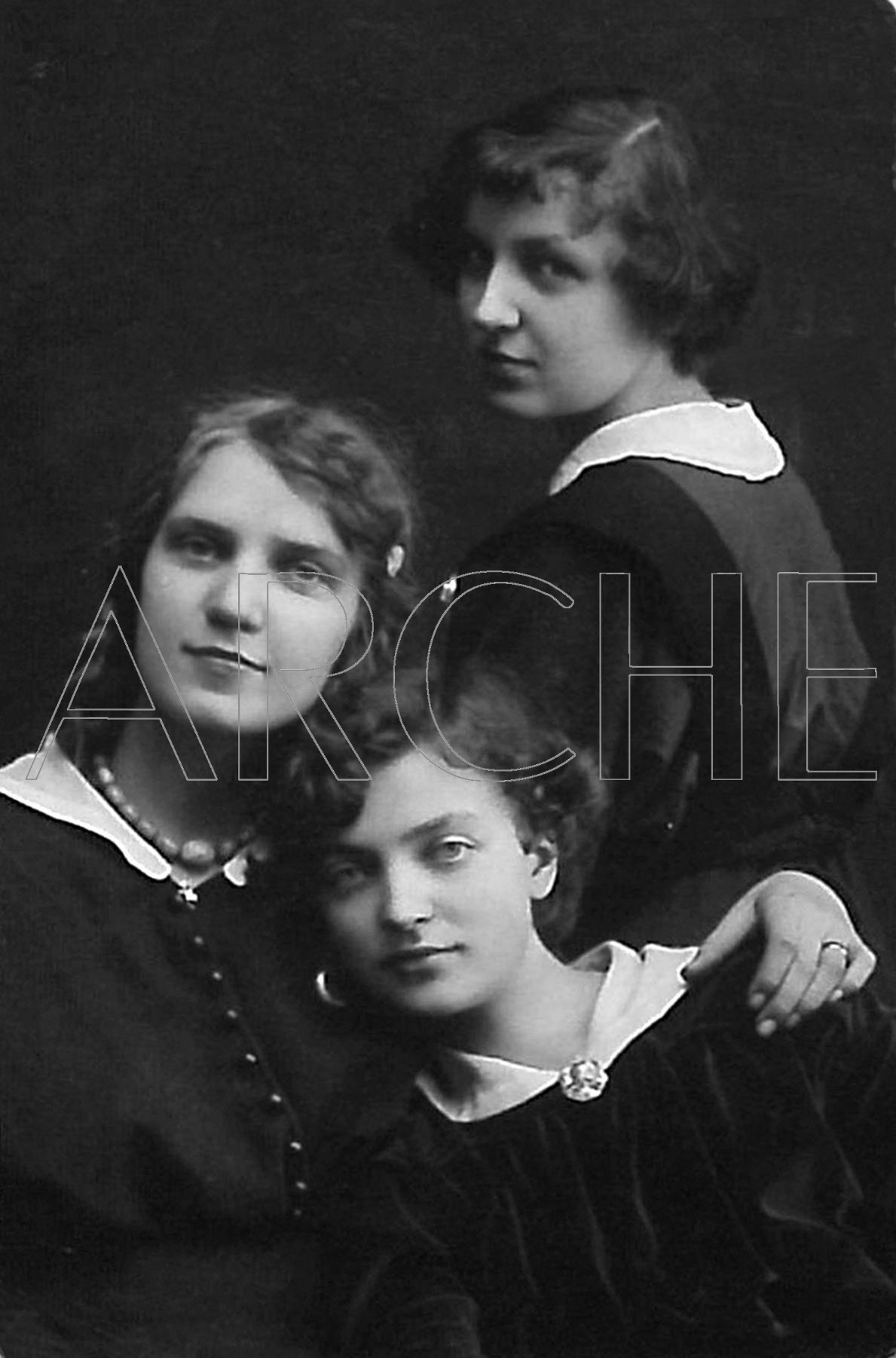 Беларуская тэатральная актрыса і педагог Паўліна Мядзёлка (1893—1974; сядзіць у цэнтры) разам са сваімі сяброўкамі па вучобе ў Віленскай гімназіі прыватнай жаночай гімназіі Няздзюравай роднымі сёстрамі Юрашайцене — Аленай (сядзіць злева) і Аляксандрай. Фота пачатку 1910-х гадоў зроблена ў прыватным фотаатэлье Марыі Залескай ў Бельску.